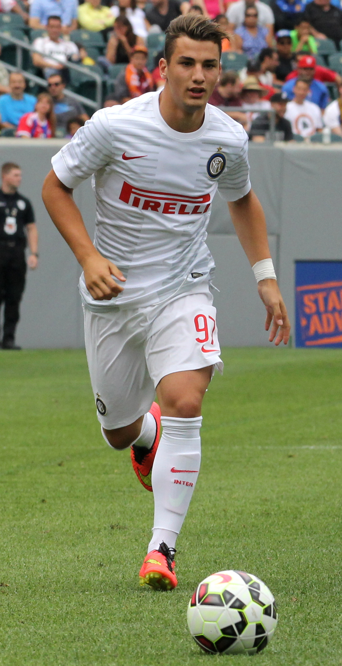 Federico Bonazzoli